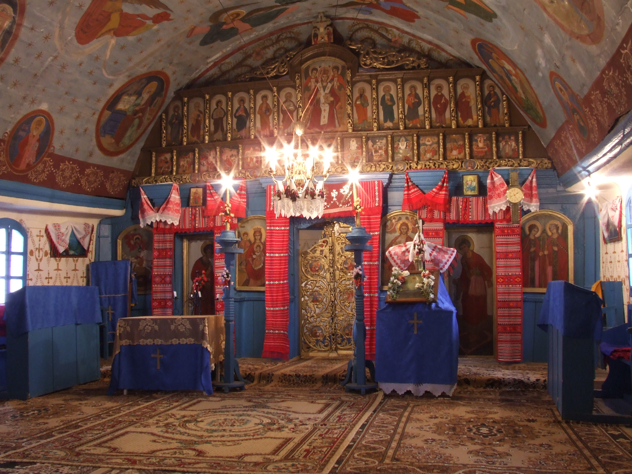 Biserica de lemn din Bărboşi, judeţul Mureş.